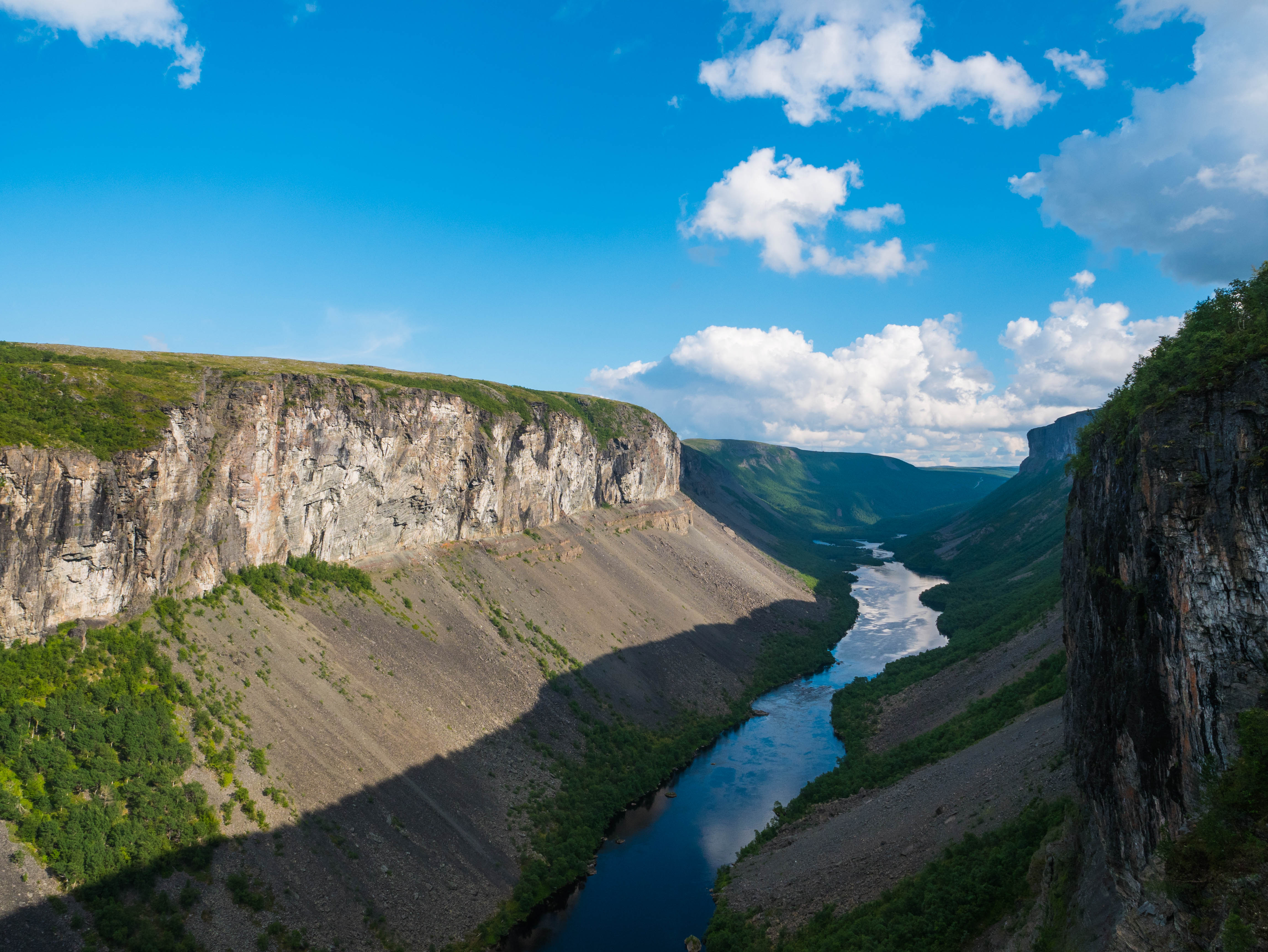 Bilde av canyon i Alta med Altaelva i bunnen.